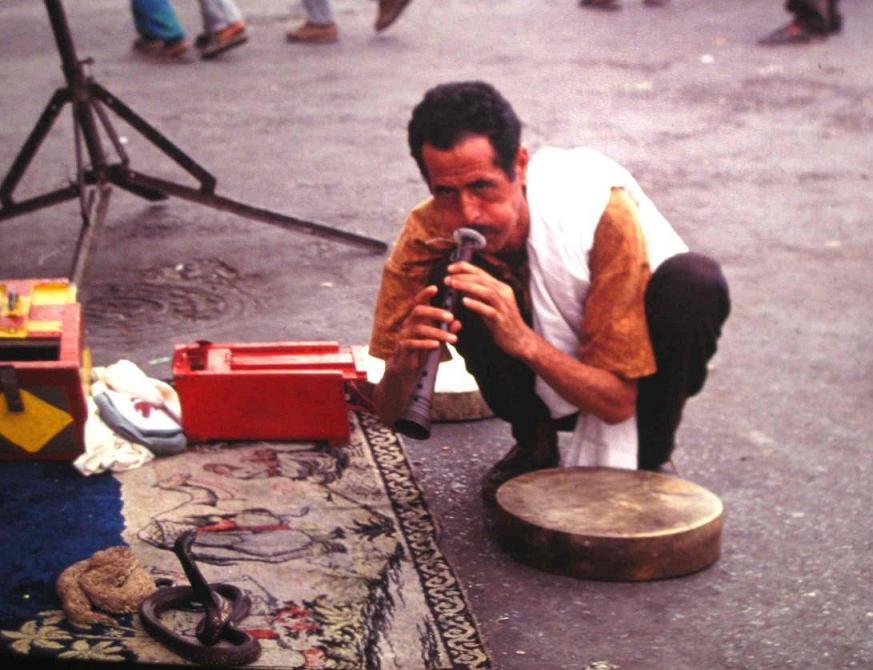 Marrakesh - Jemaã El Fna